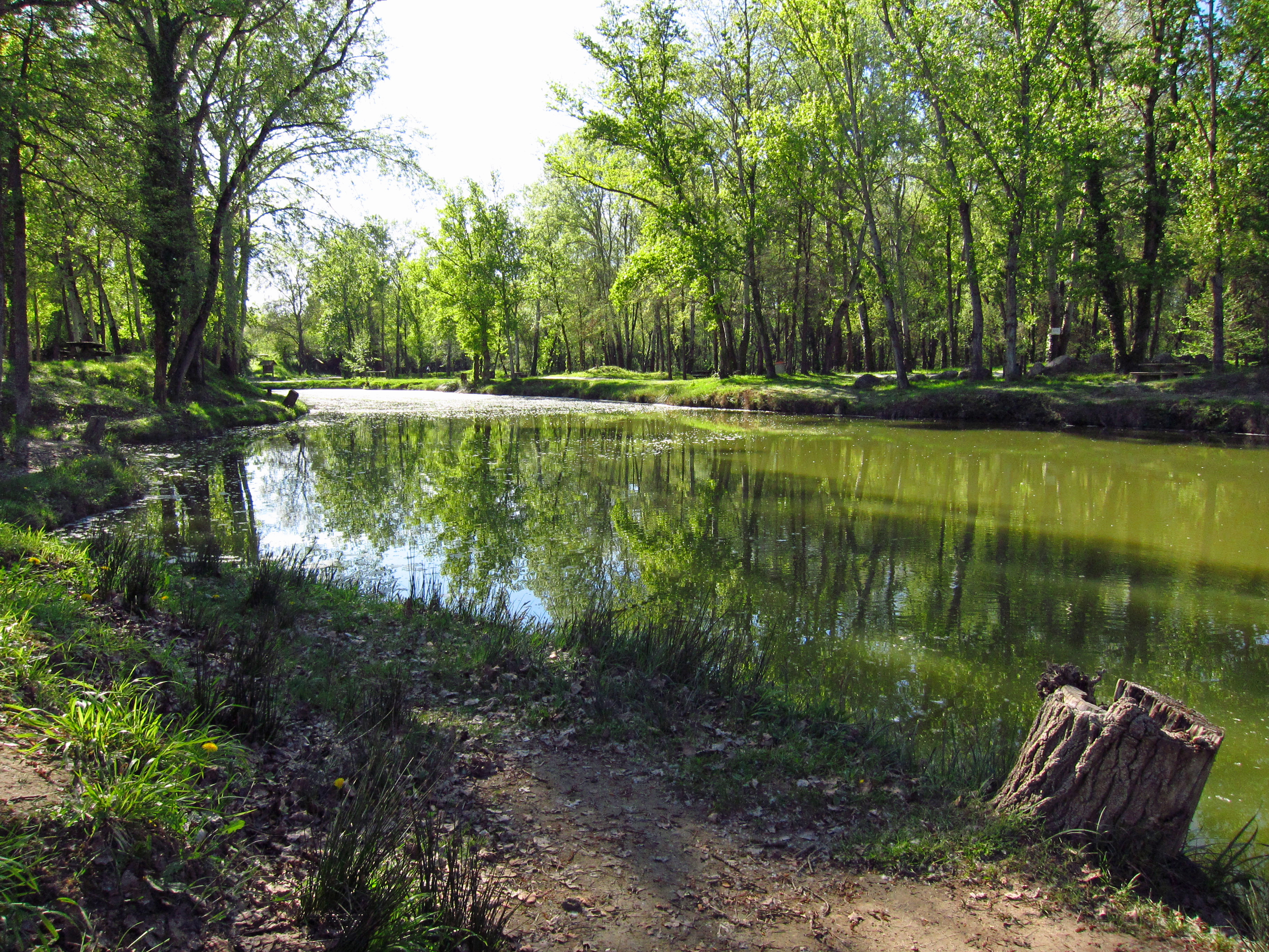 Blagnac (Haute-Garonne, Midi-Pyrénées, France) : Lacs des Quinze Sols. Anciennes gravières.